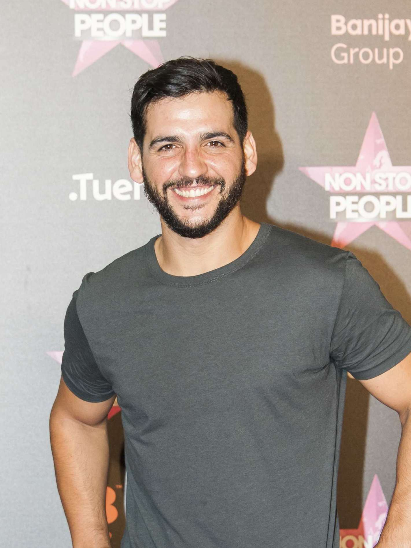 Fotos del photocall y fiesta de lanzamiento de un nuevo canal de televisión en España.